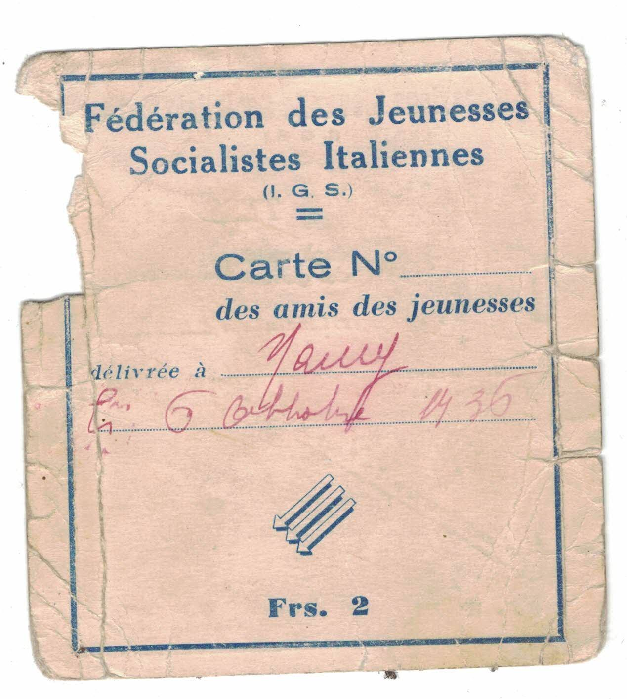 Tessera della FGSI durante la guerra civile spagnola